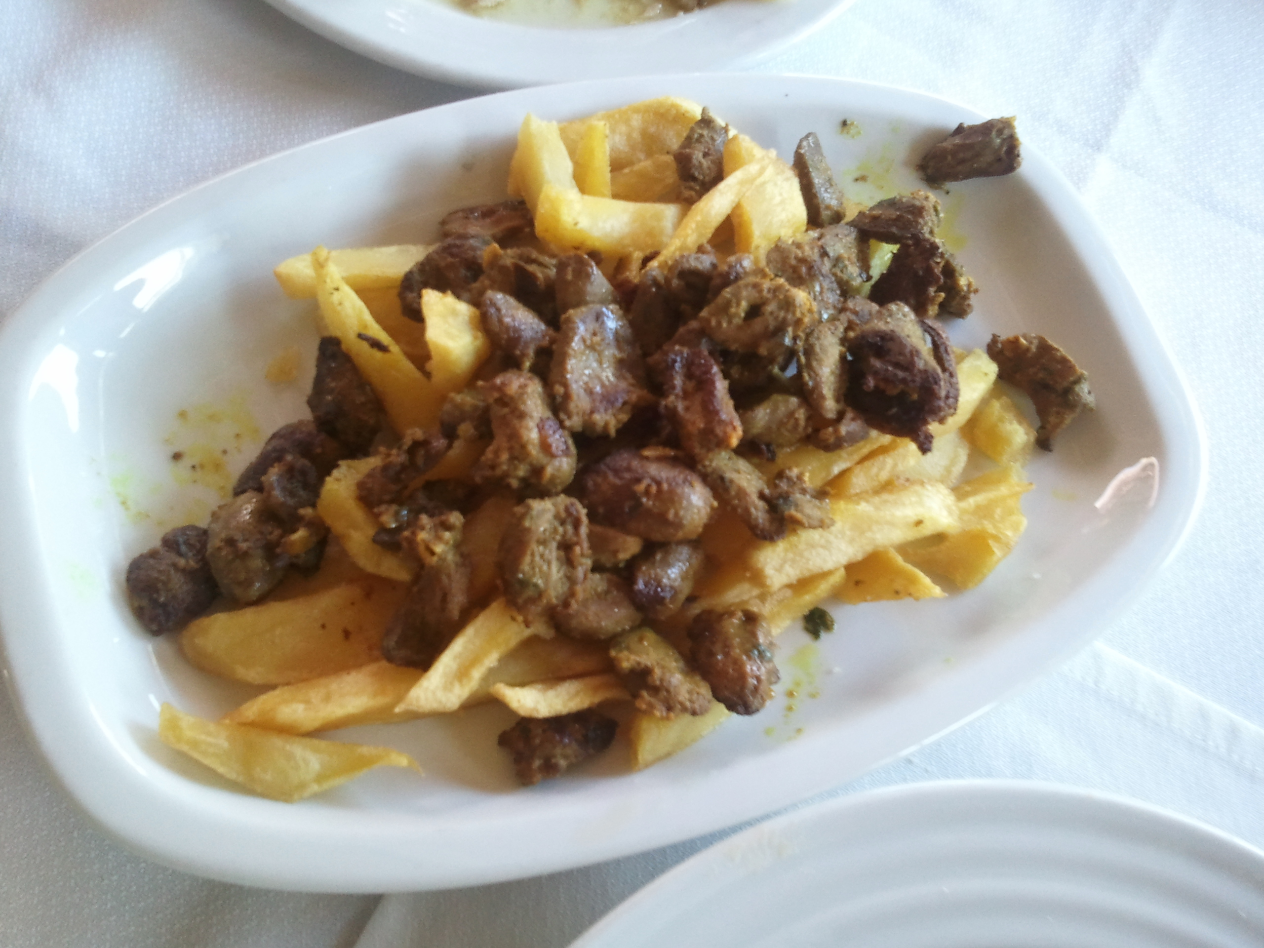 Corazones de pollo preparados con la mezcla de especias de los pinchitos morunos. Ceuta, España.